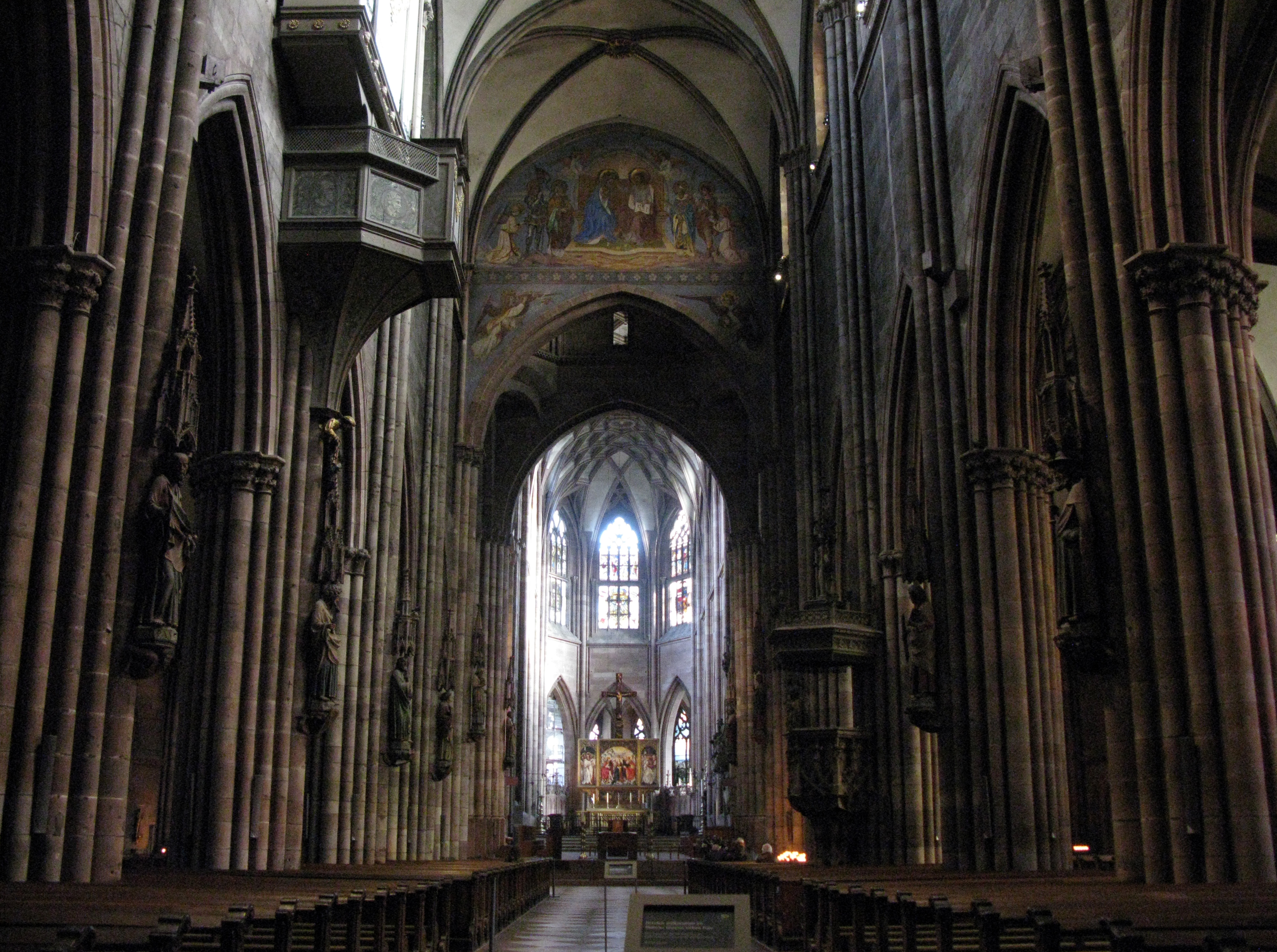 Freiburger Münster, Mittelschiff mit Schwalbennestorgel (links oben)